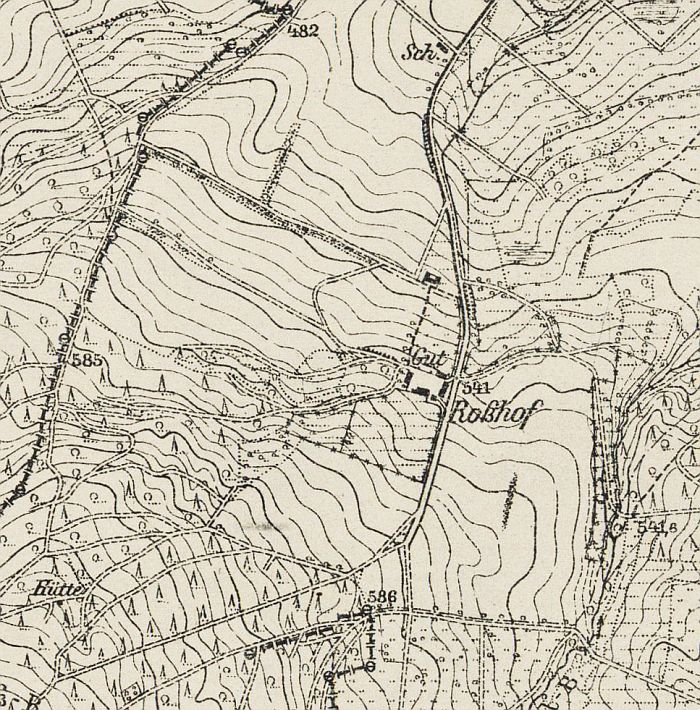 Roßhof Karte Meßtischblatt Ausschnitt 3115 Roßdorf 1919